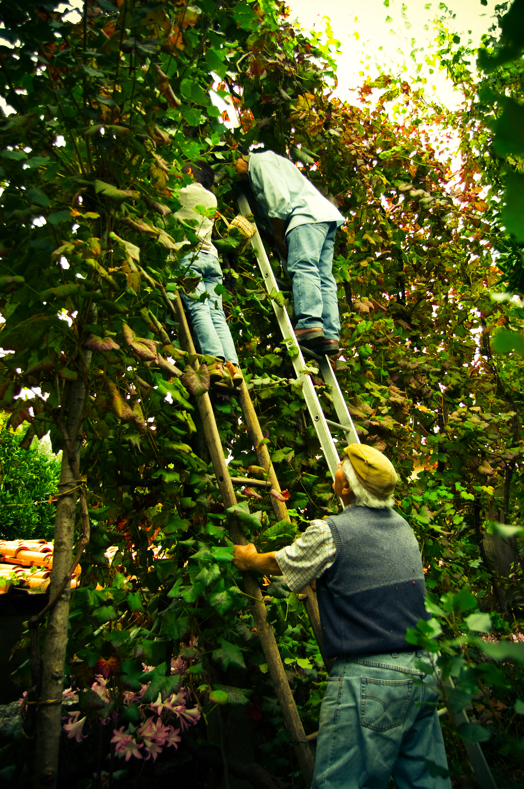 Vindima em Guimarães,Portugal